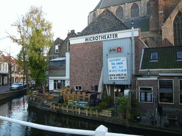 Microtheater, Delft